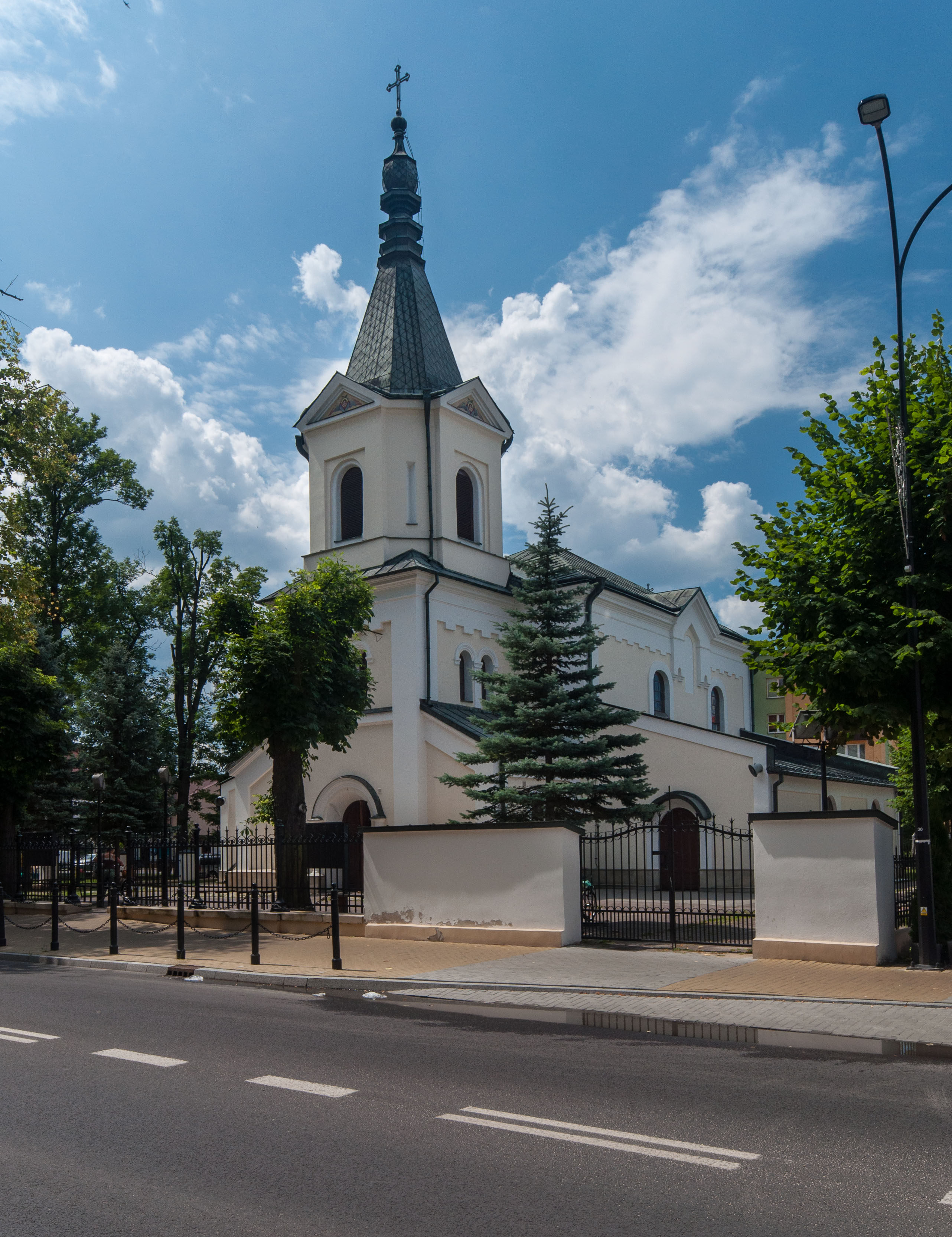 Biłgoraj, cerkiew greko-kat. ob. kościół rzym.-kat. p.w. św. Jerzego, 1790, 1919